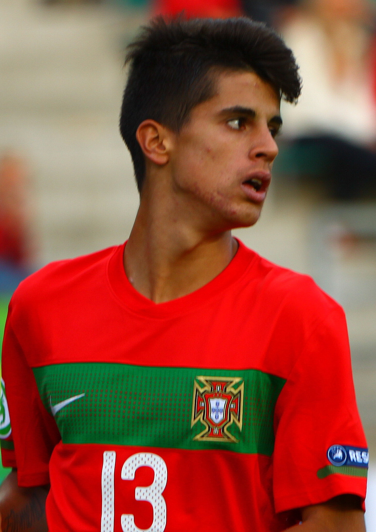 João Cancelo